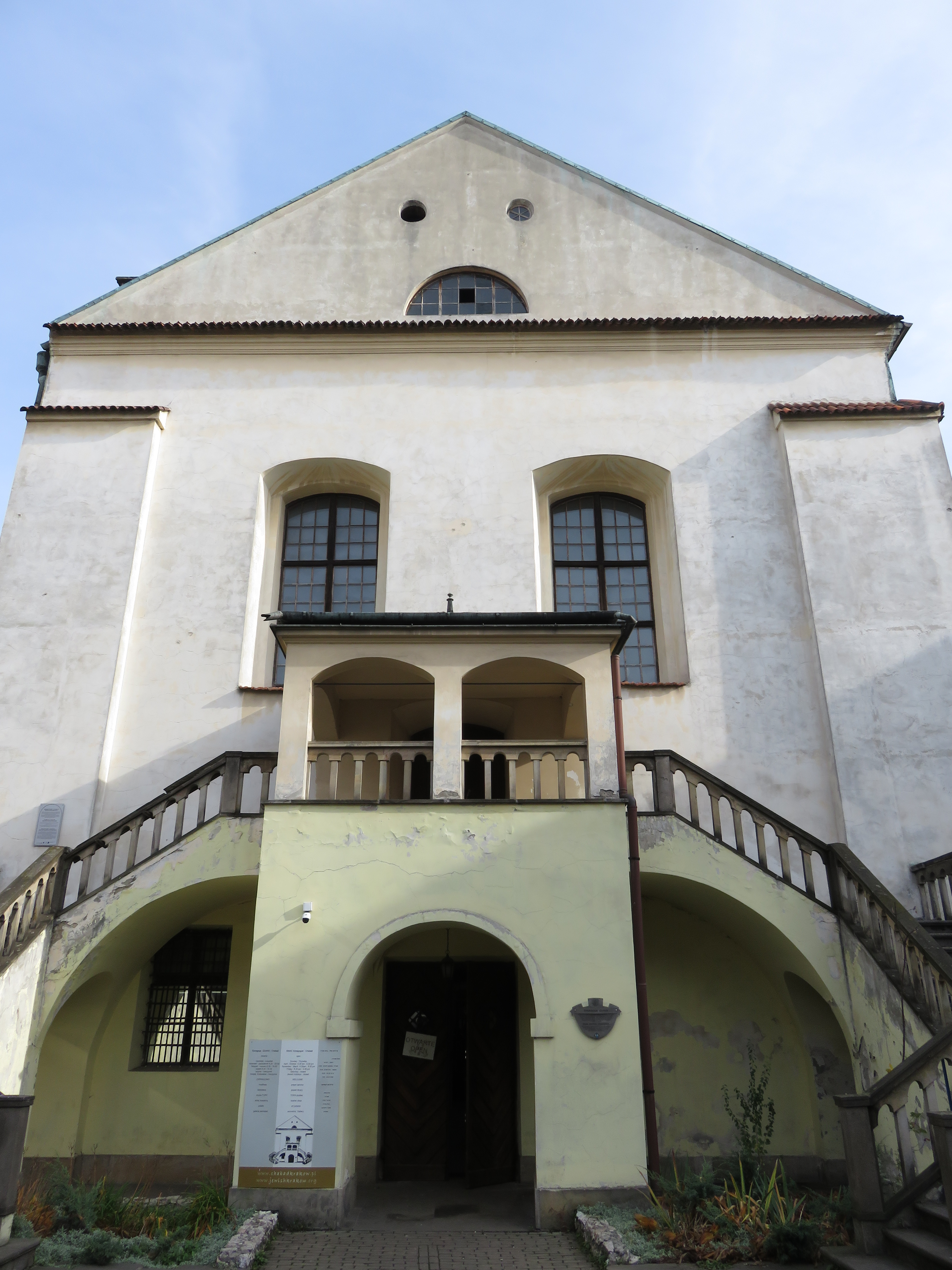 אייזיק שוהל גובה.jpg